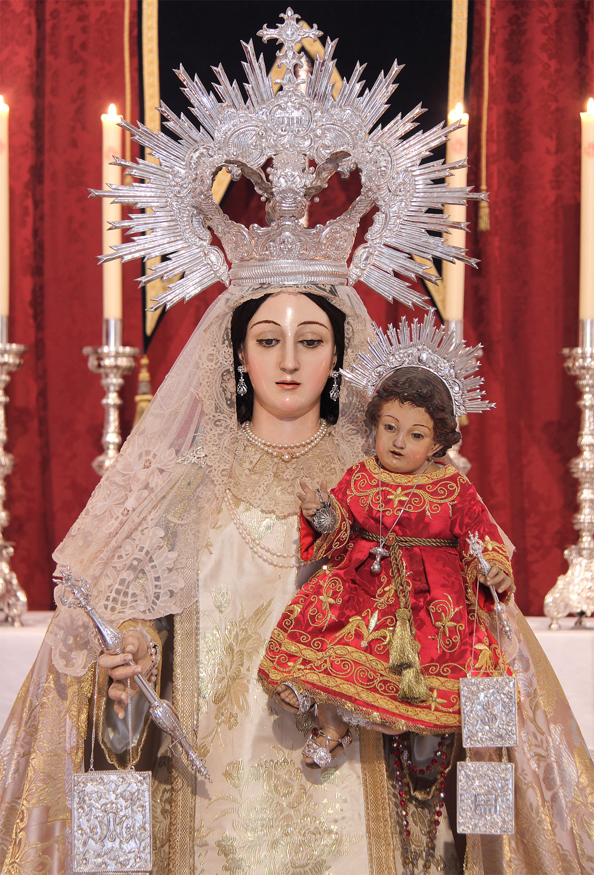 Ntra. Sra. de las Mercedes de San Fernando (Cádiz) ESPAÑA